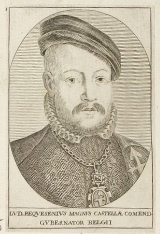 Grafik aus dem Klebeband Nr. 1 der Fürstlich Waldeckschen Hofbibliothek Arolsen Motiv: Luis de Requesens